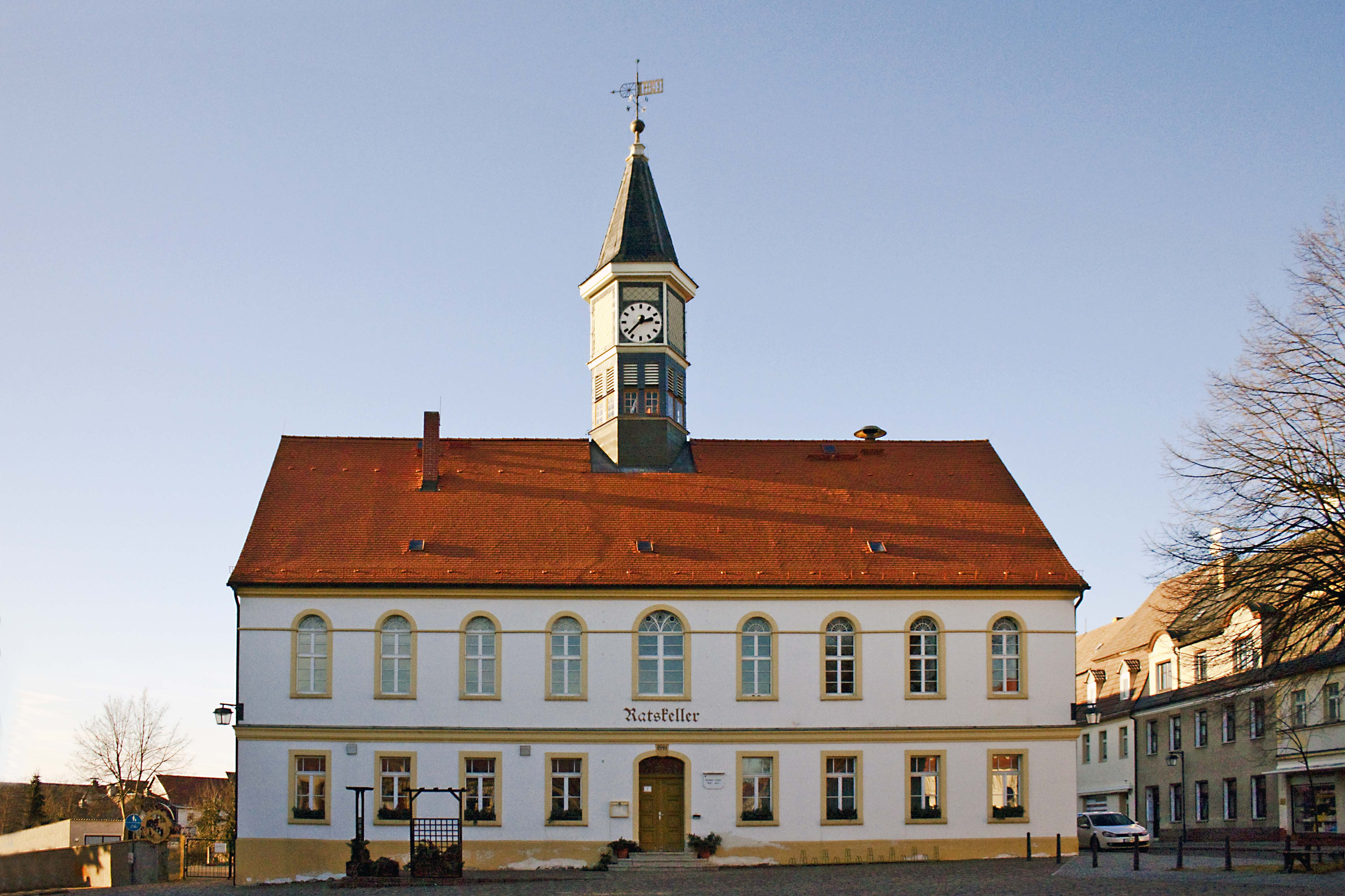 Rathaus in Schildau